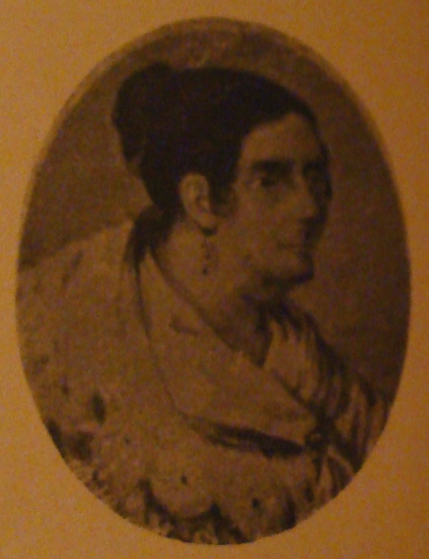 Casilda Igarzabal (1774-1844), patricia, esposa de Nicolás Rodríguez Peña